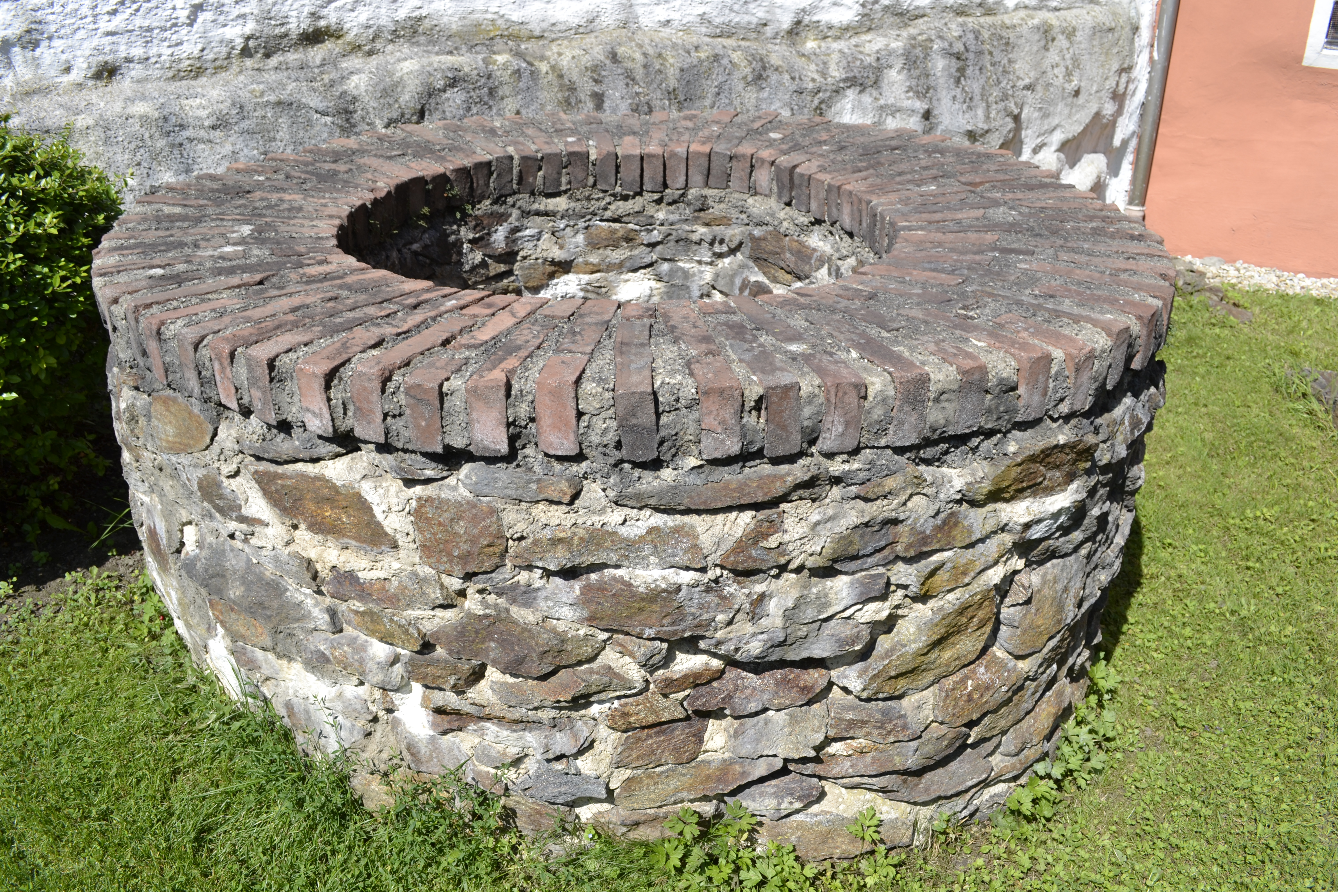 Der restaurierte Brunnenschacht in der SW-Ecke auf dem Gelände des Römermuseums Kastell Boiotro in Passau.